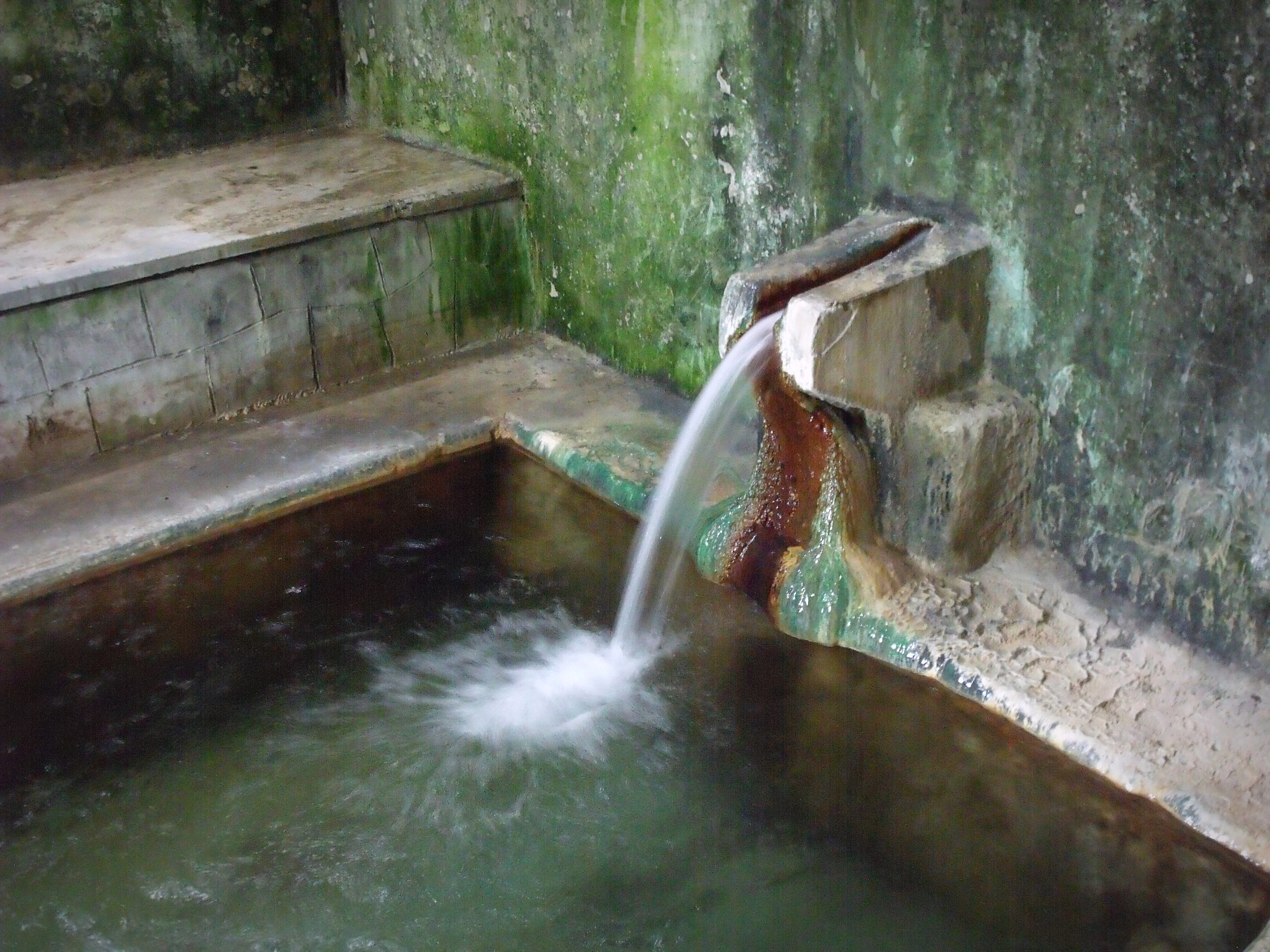 Banja Mehmed-paše Sokolovića u Višegradu Сликава е подигната во рамките на проектот „По трагата на душата 2015“.